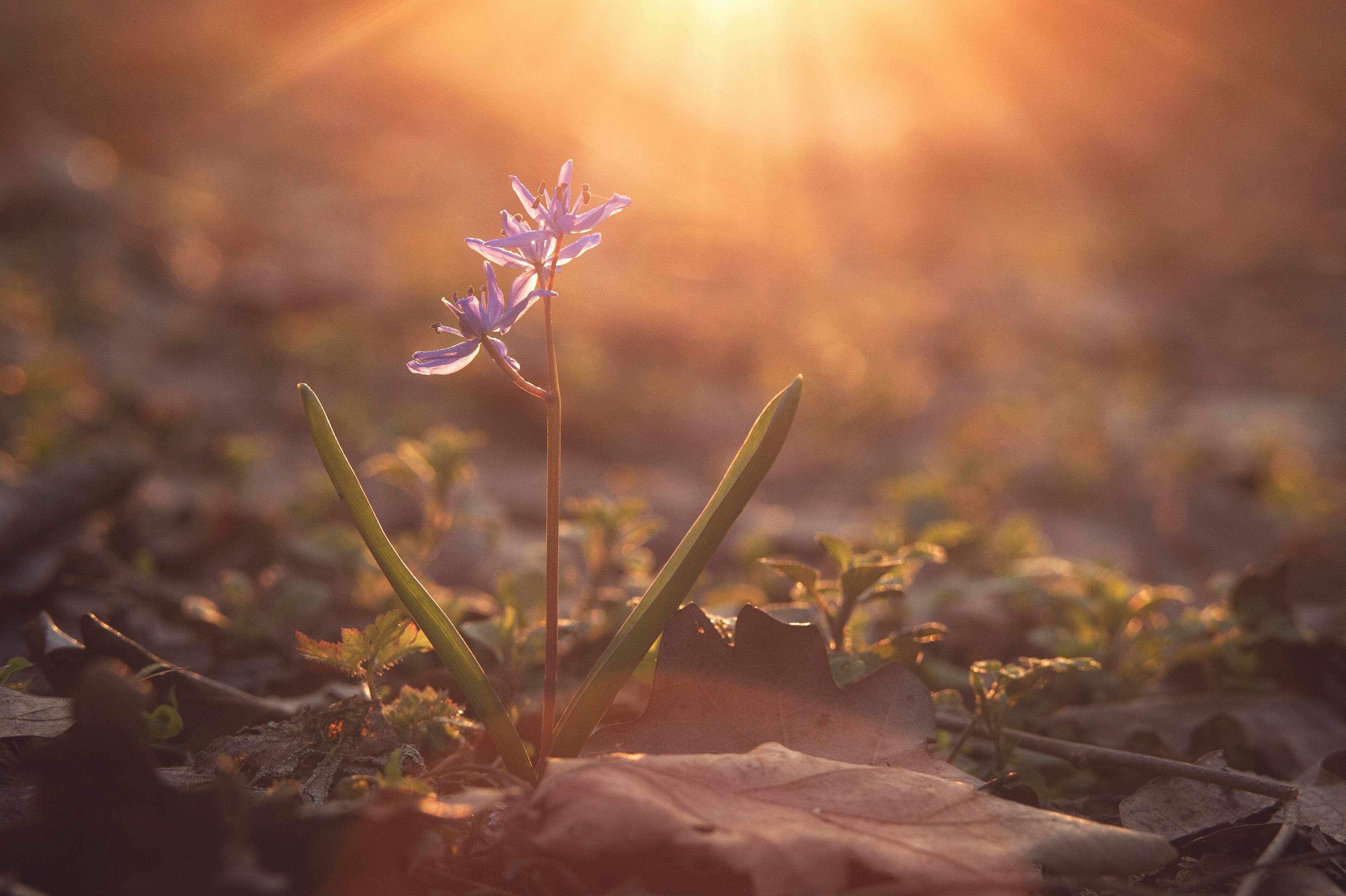 «Урочище Унава», Фастівський район, Волицька сільська рада